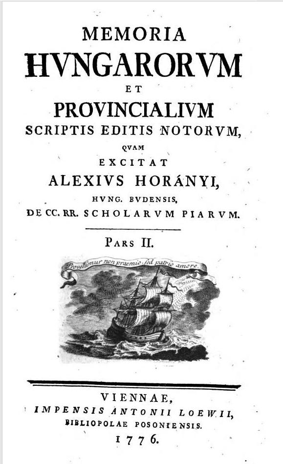 Horányi Elek művének, az 1145 magyar író életrajzát tartalmazó Memoria Hungarorum II. kötetének címlapja, 1776